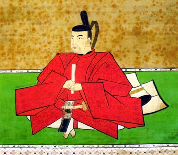 鳥居忠英の肖像。